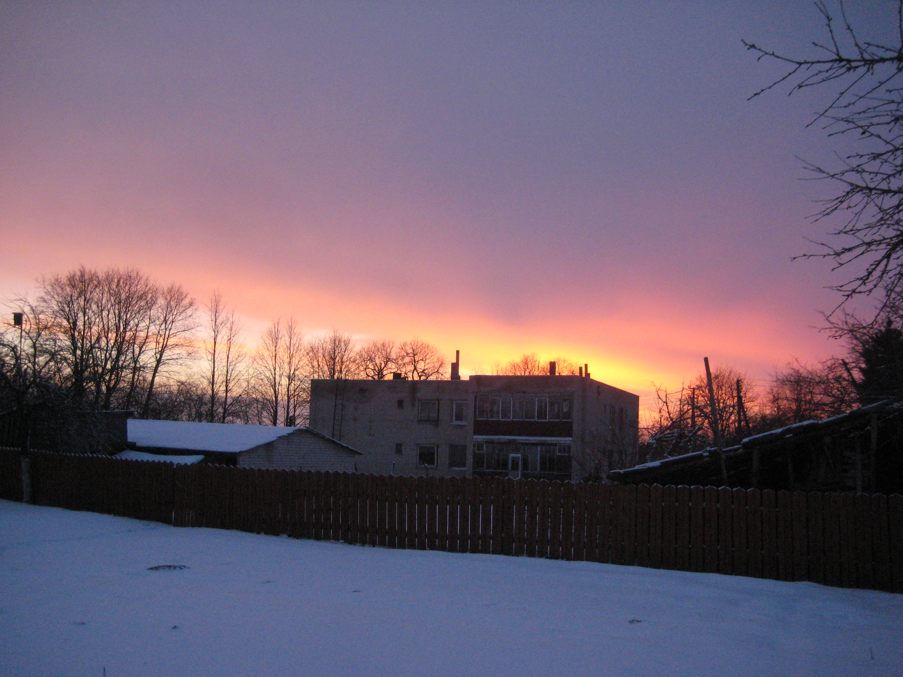 Degučiai, Lithuania